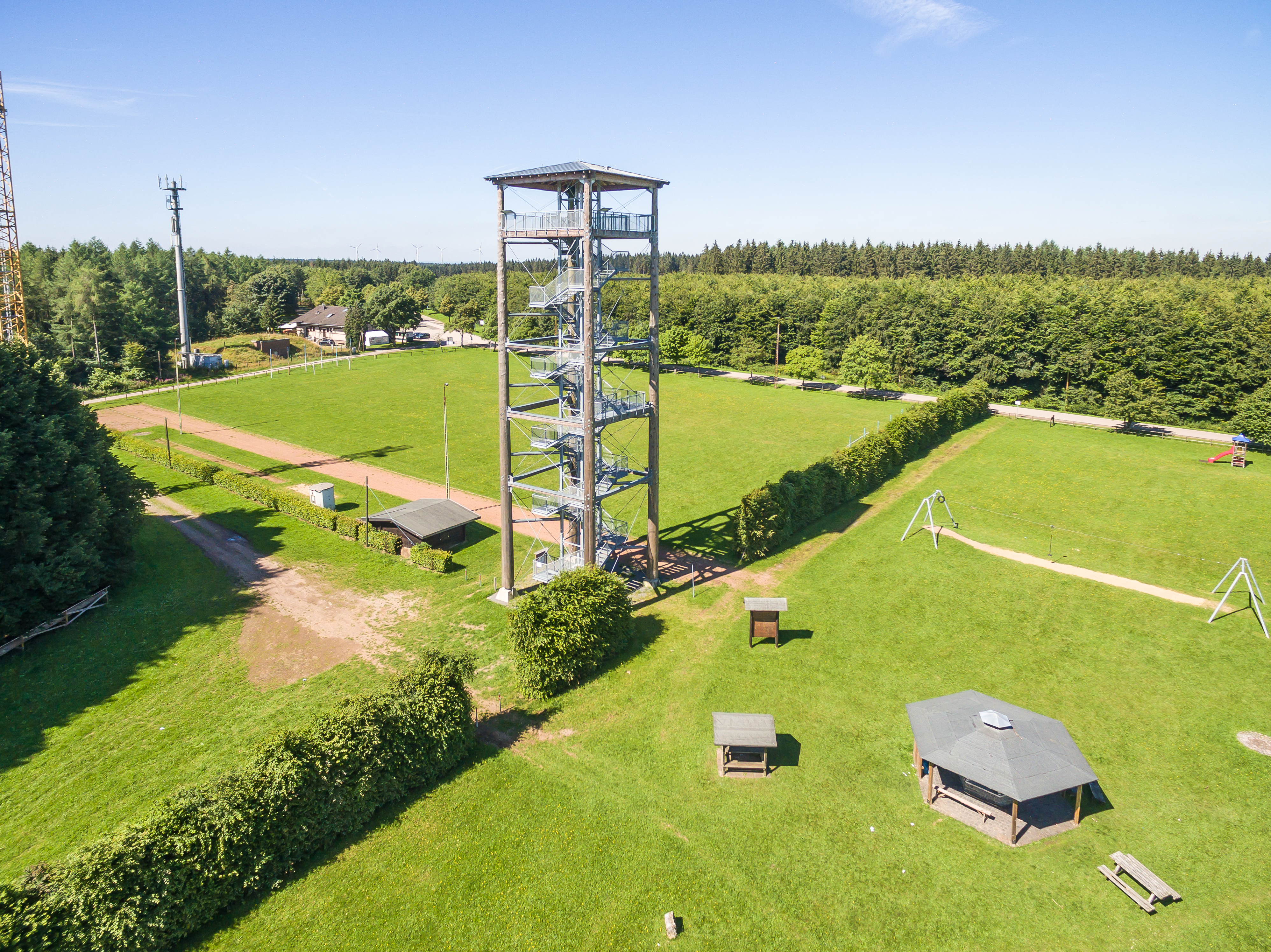 Aussichtsturm Weißer Stein nahe Hellenthal, Eifel